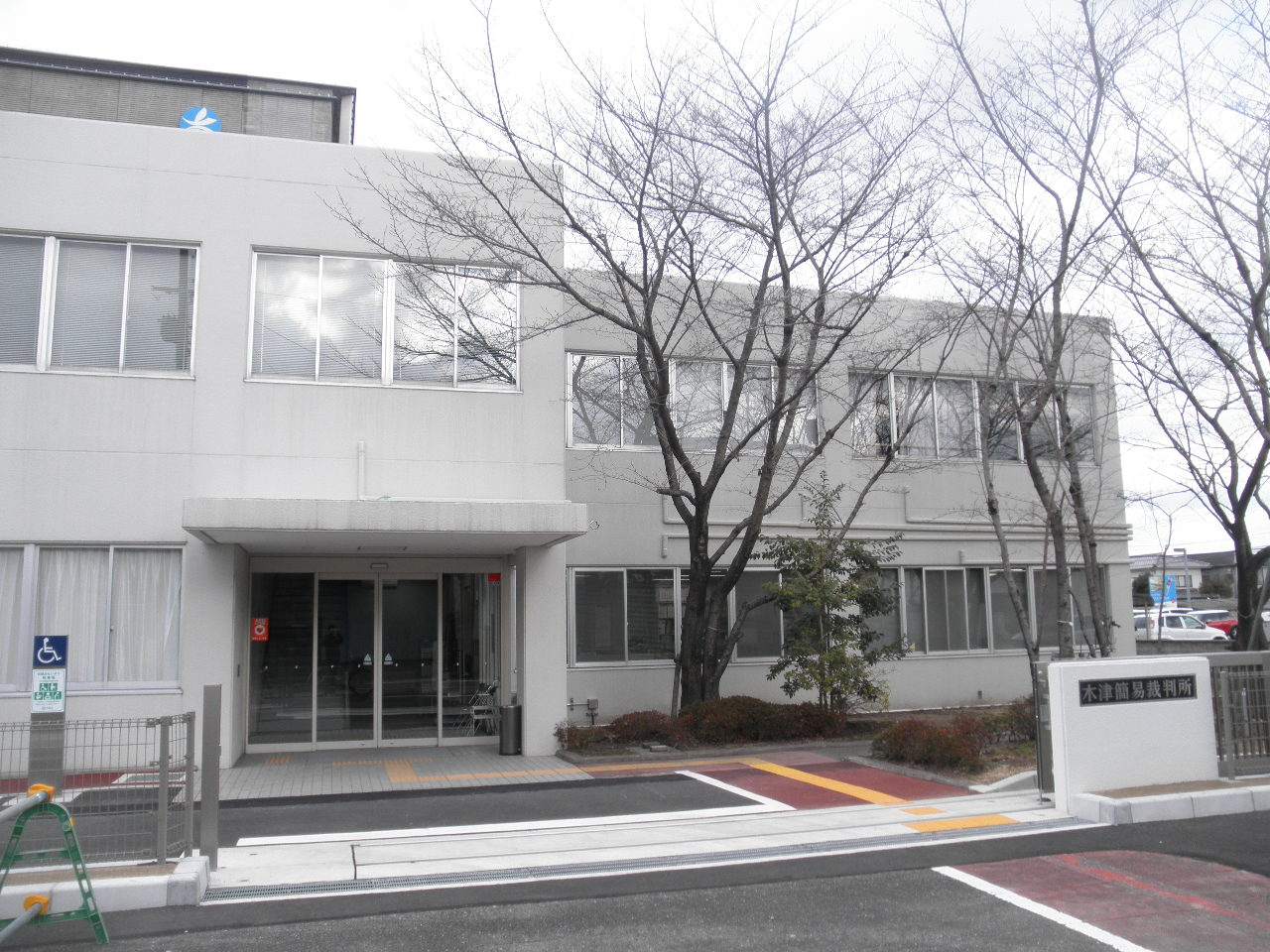 木津簡易裁判所